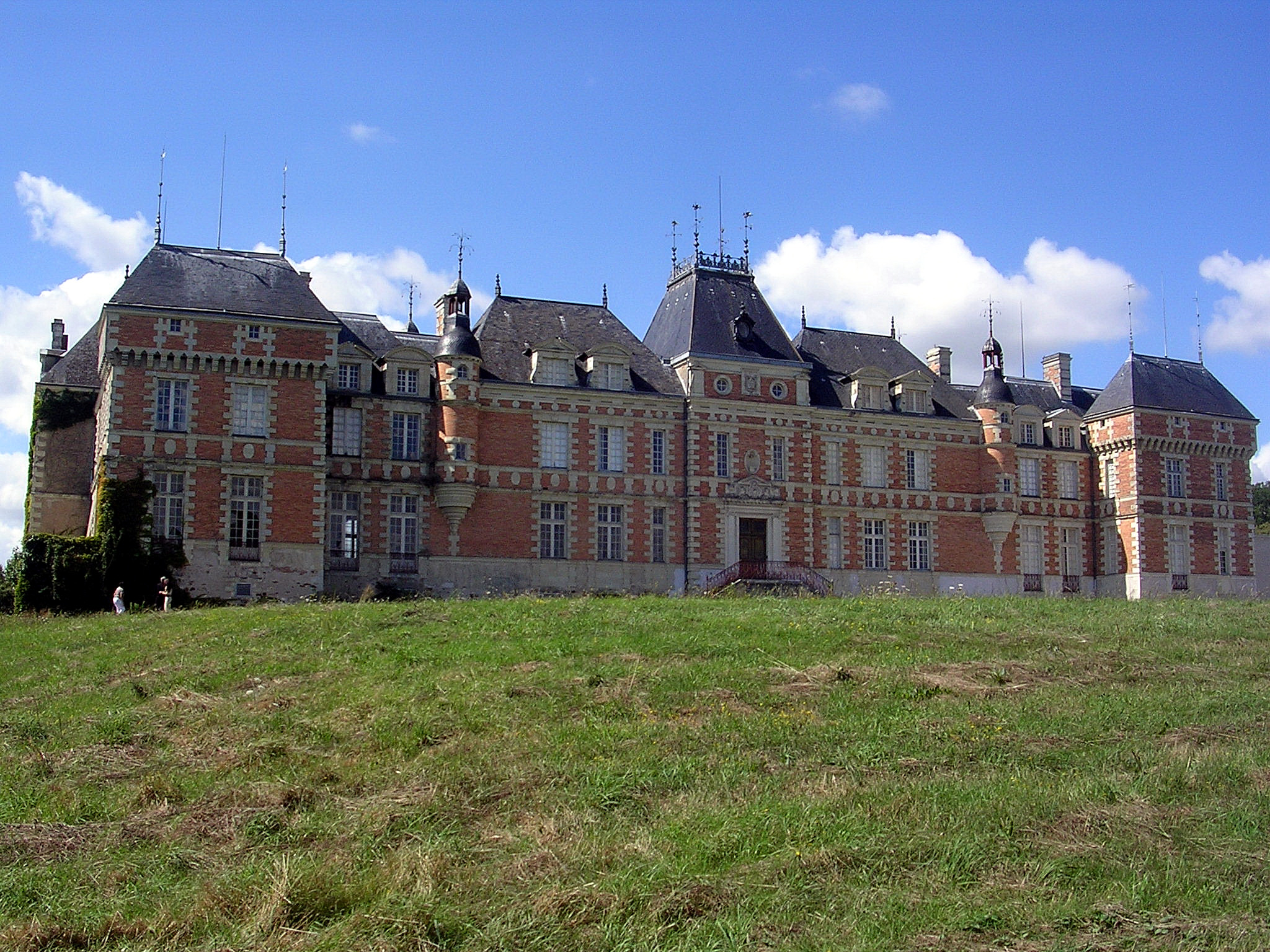 Château de Clermont au Cellier (Loire Atlantique, France)